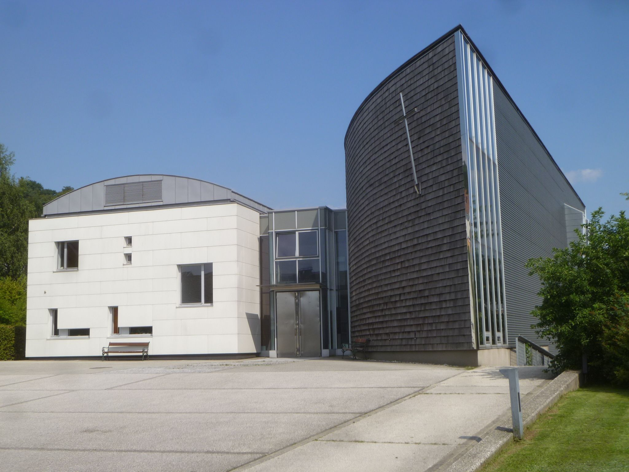 Kath. Pfarrkirche Christus der Auferstandene